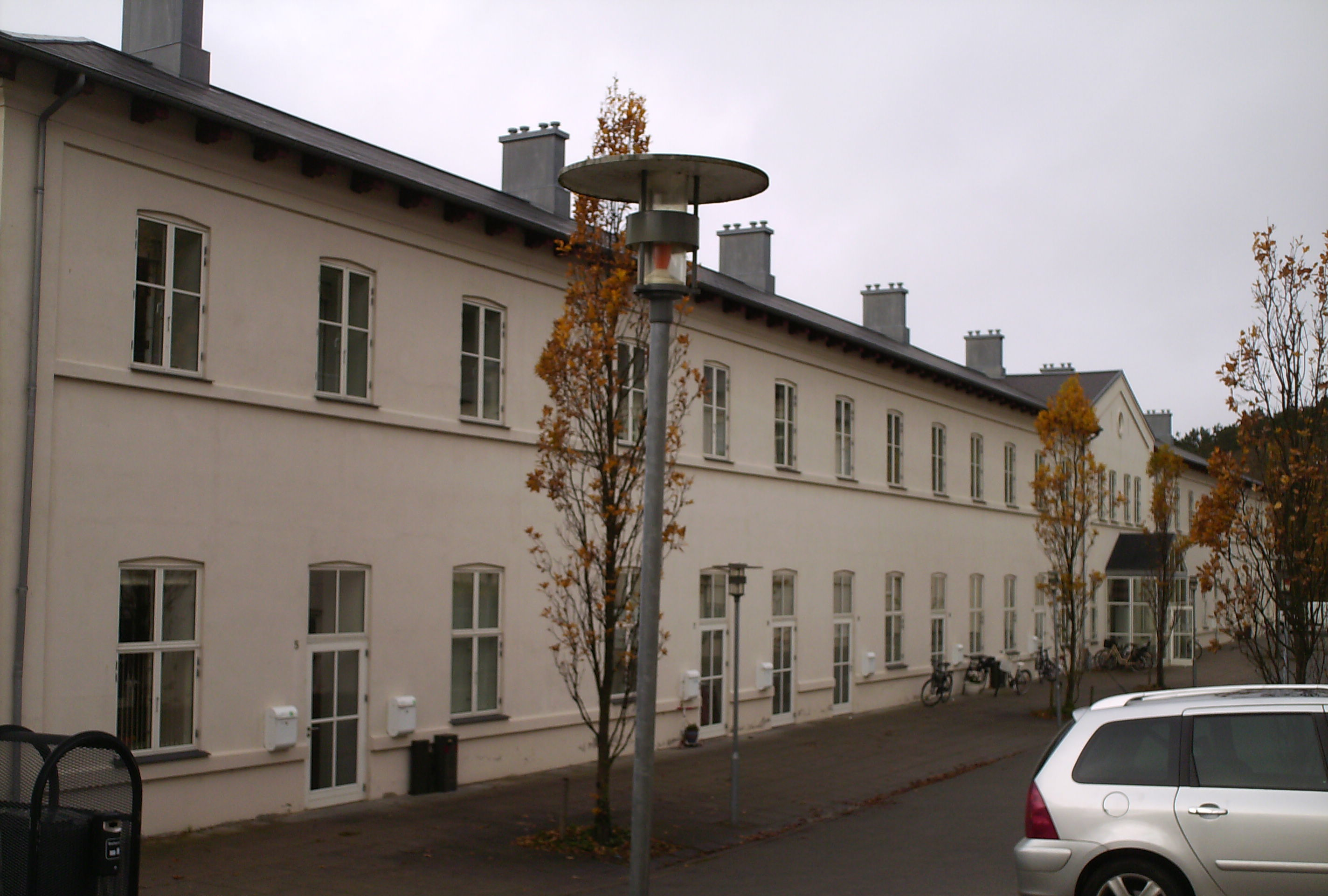 Hovedbygningen på det nu nedlagte kysthospital ved Refsnæs ved Kalundborg